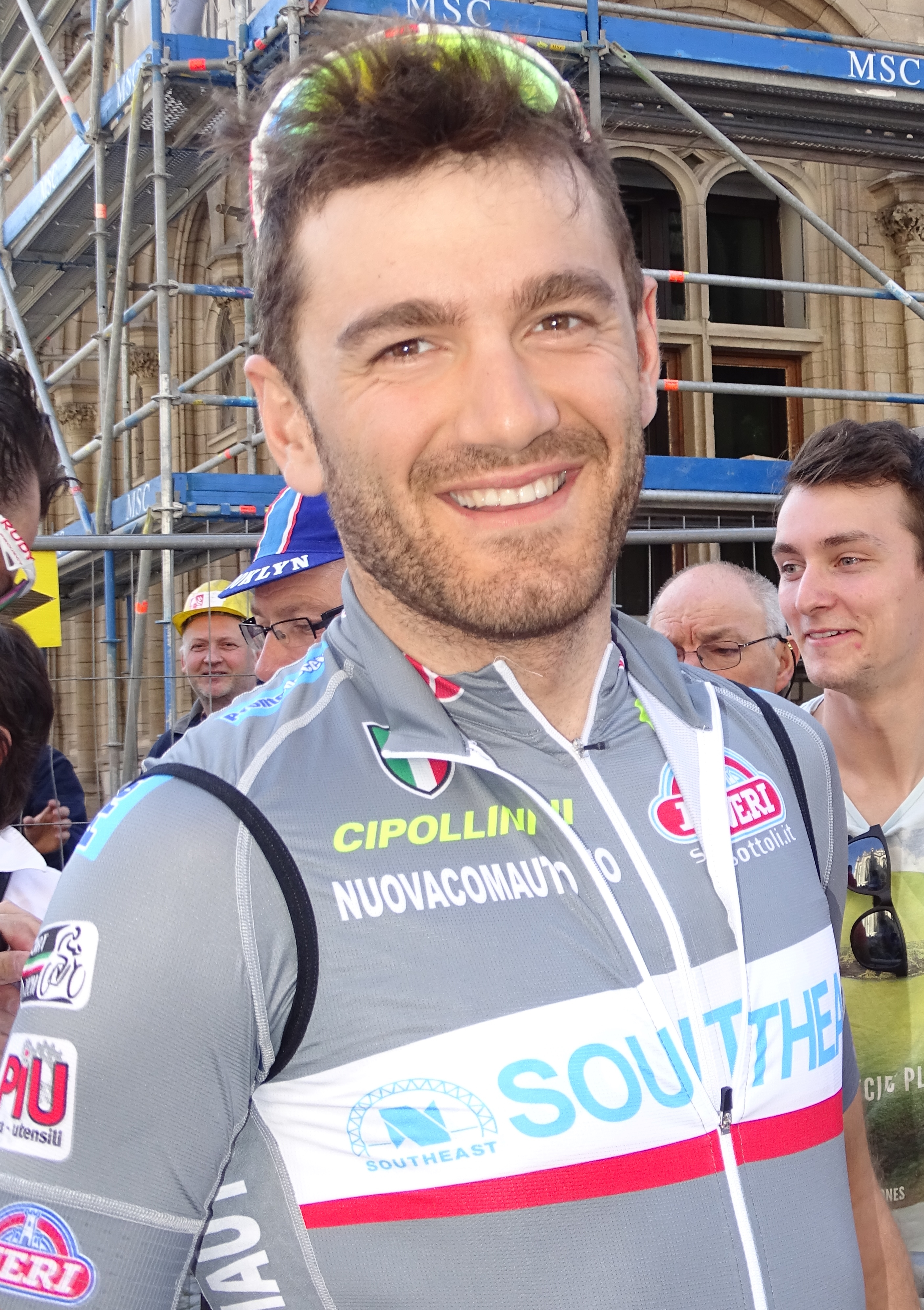 Reportage réalisé le mercredi 15 avril à l'occasion du départ de la Flèche brabançonne 2015 à Louvain, Belgique.